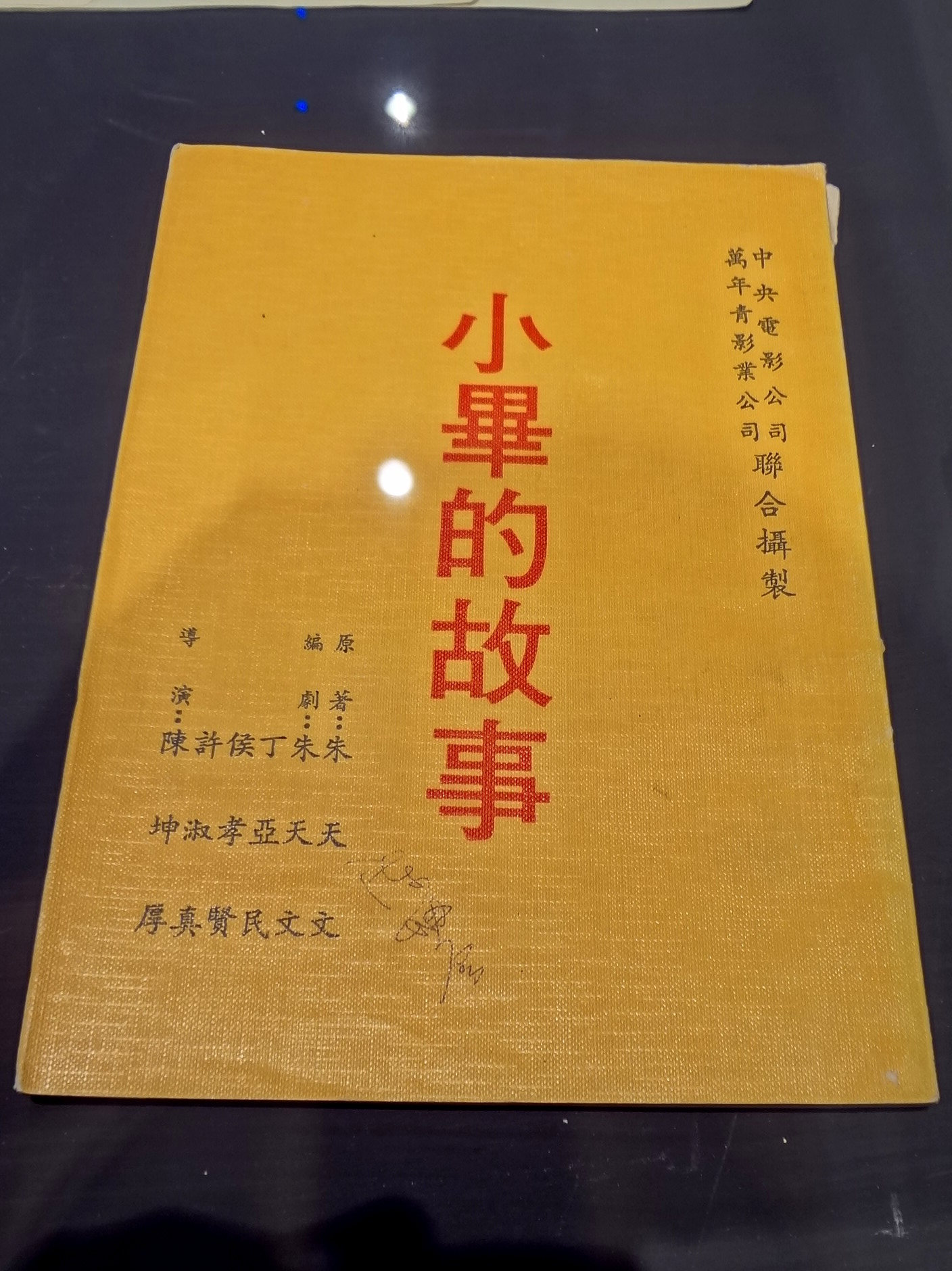 金馬50風華展展示的中央電影公司電影《小畢的故事》劇本。